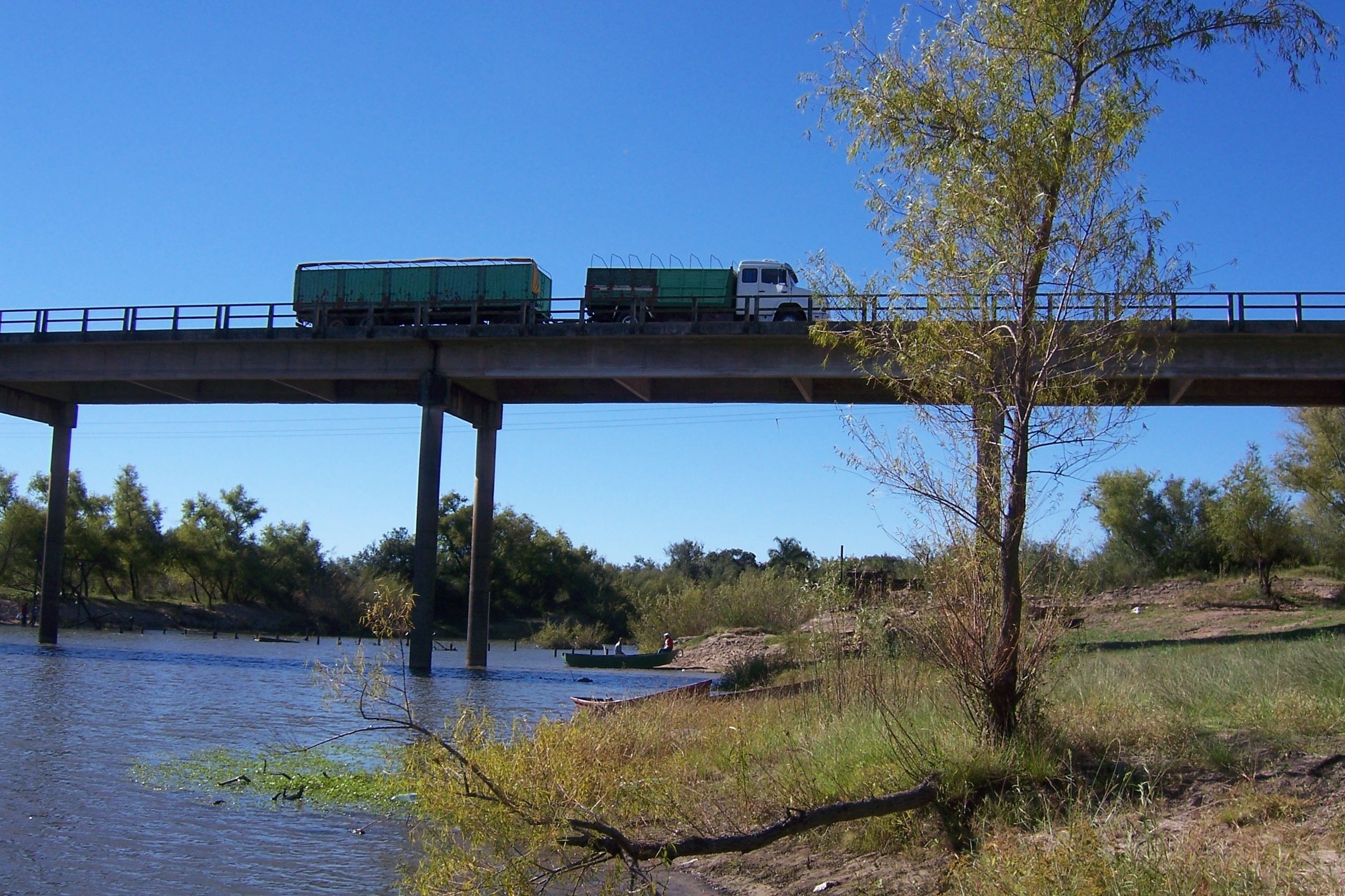 Río Tacuarembó, a la altura de Villa Ansina, Uruguay. Puente sobre Paso del Borracho, ruta nacional N° 26, departamento de Tacuarembó. La cámara apunta en dirección norte; el río corre hacia el sur (imagen tomada desde la margen izquierda).